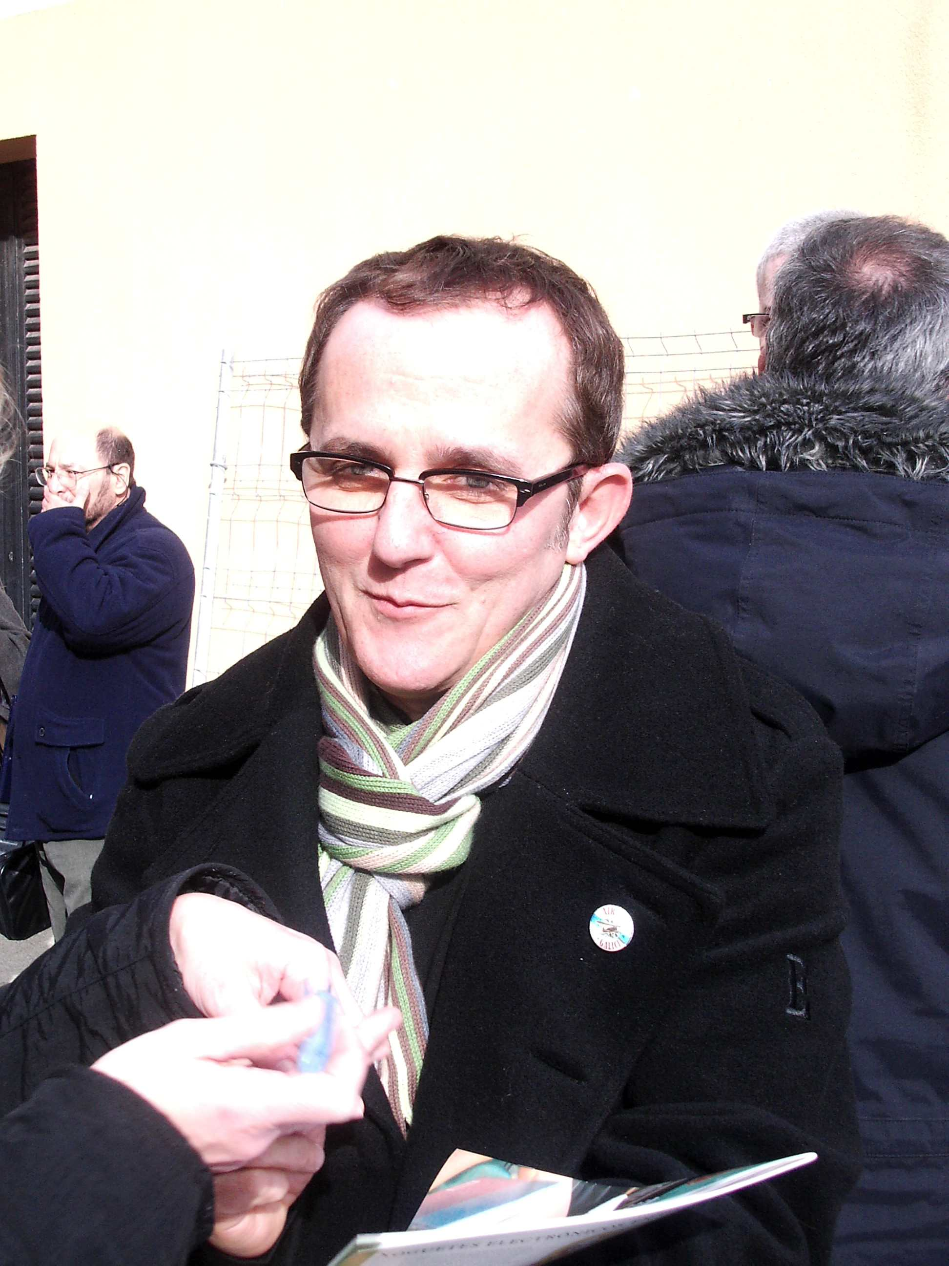 Morris, á saída da presentación de 'Os mortos van á présa' en Ribadeo.